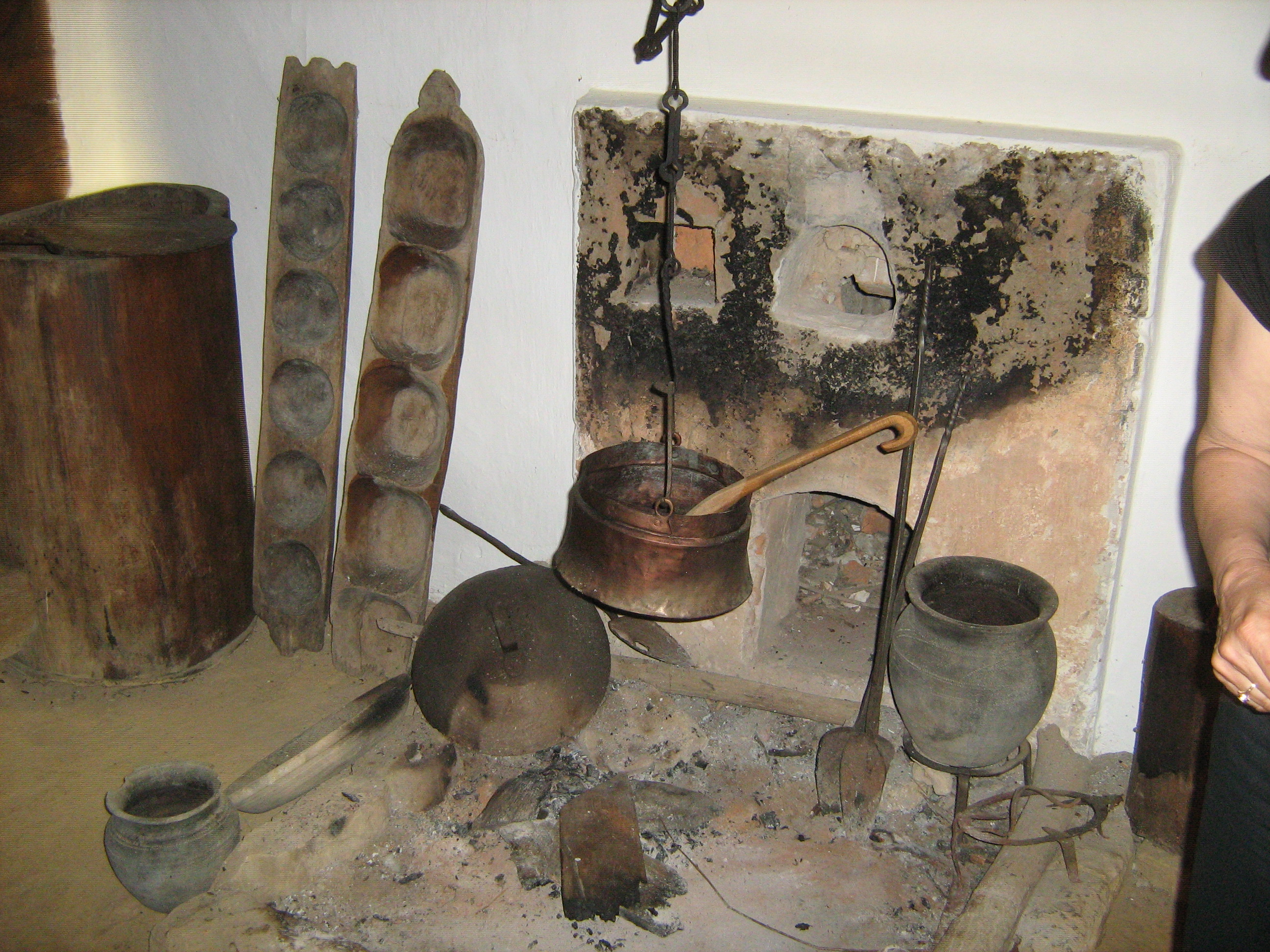 Огњиште у Вуковој кући